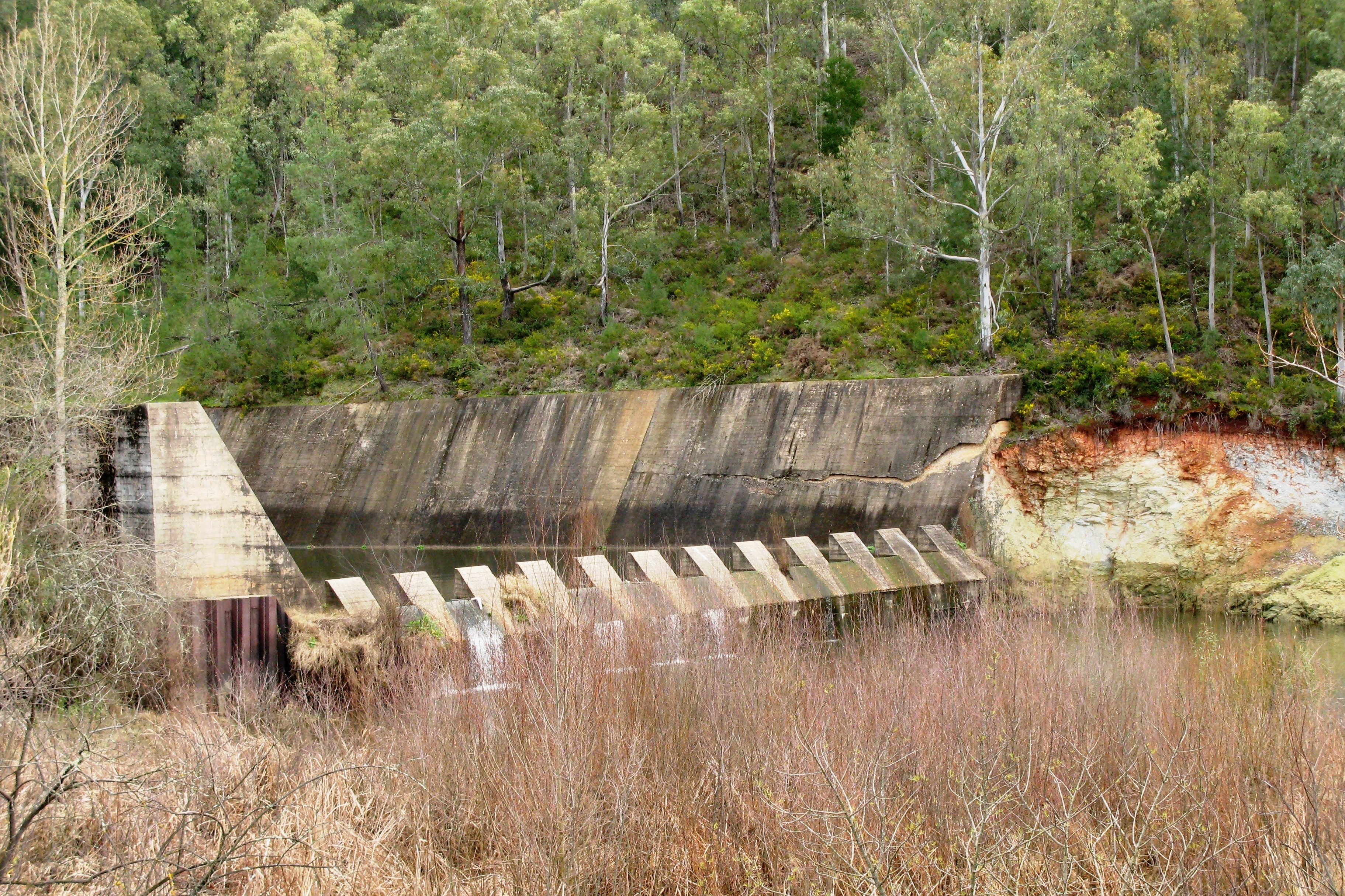 Barrage de Montargil. Bassin de radoubs.